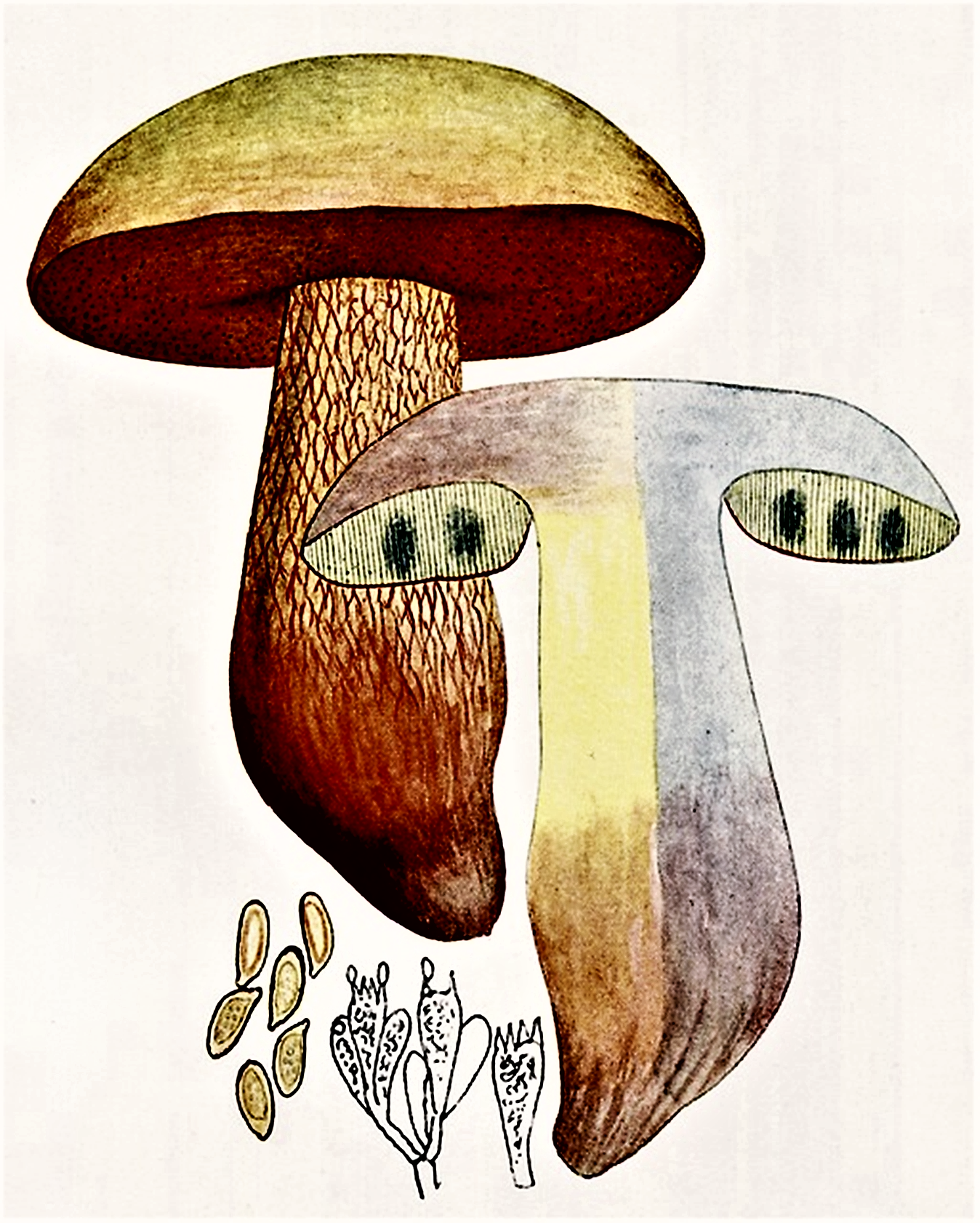 Giacomo Bresadola: Boletus luridus (Netzstieliger Haxenröhrling) Schaeff. (1774)